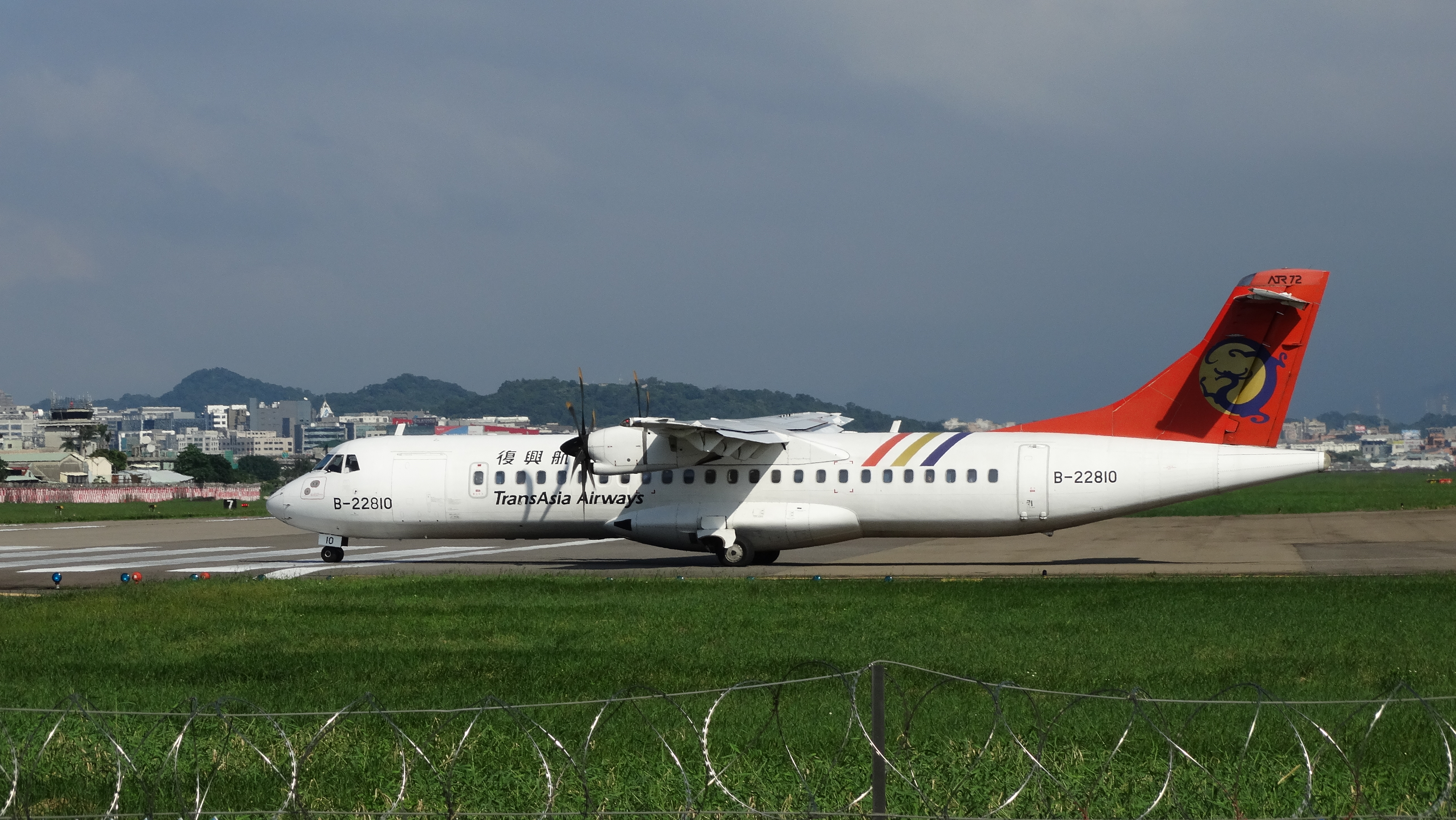 復興航空ATR 72-500 B-22810於台北松山機場準備起飛。